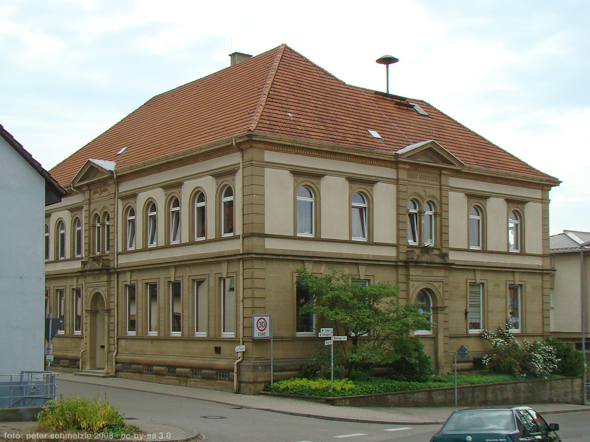 Schul- und Rathaus in Kraichtal-Landshausen